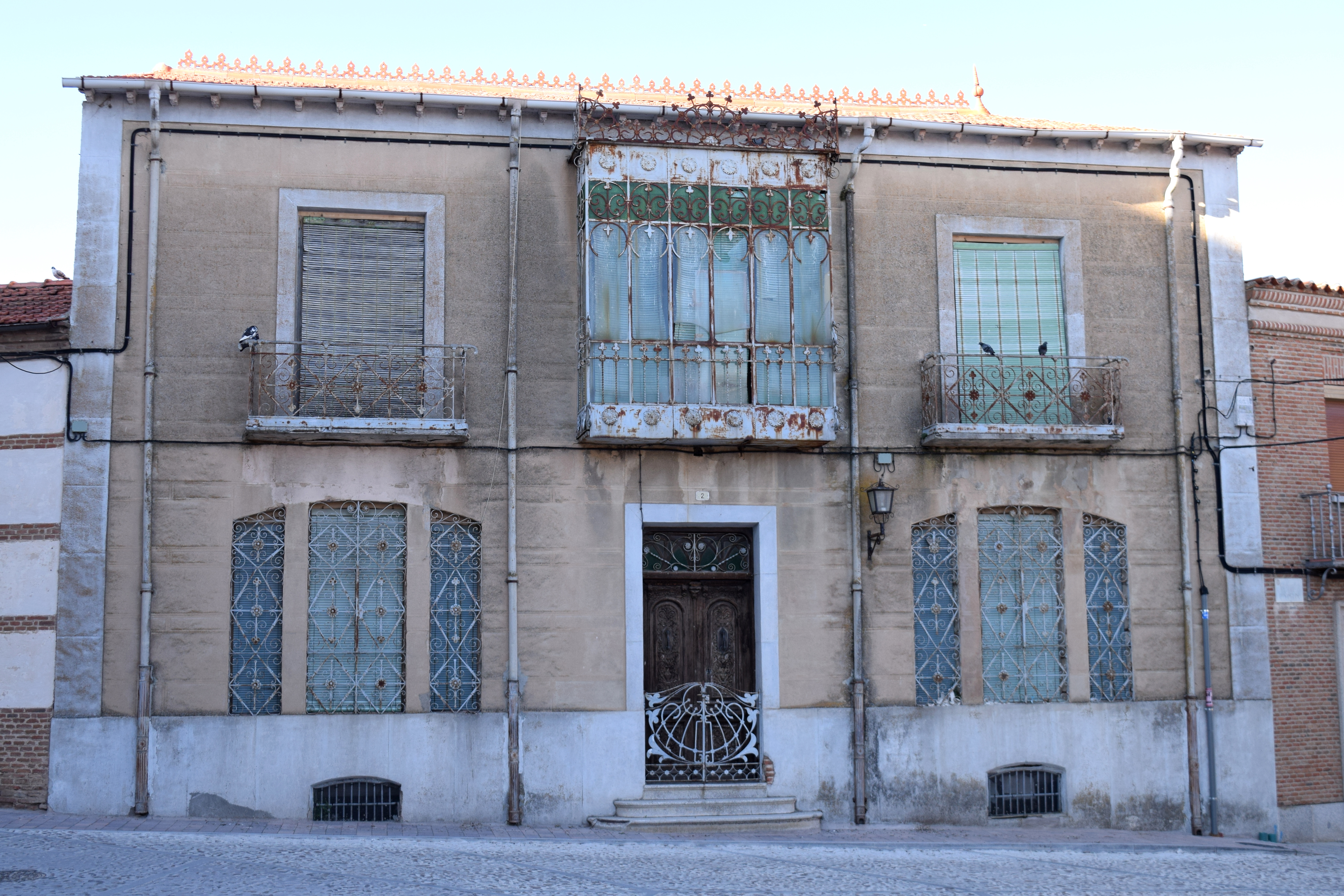 Fotografía de la fachada principal del nº 4 de la calle Sanguino.